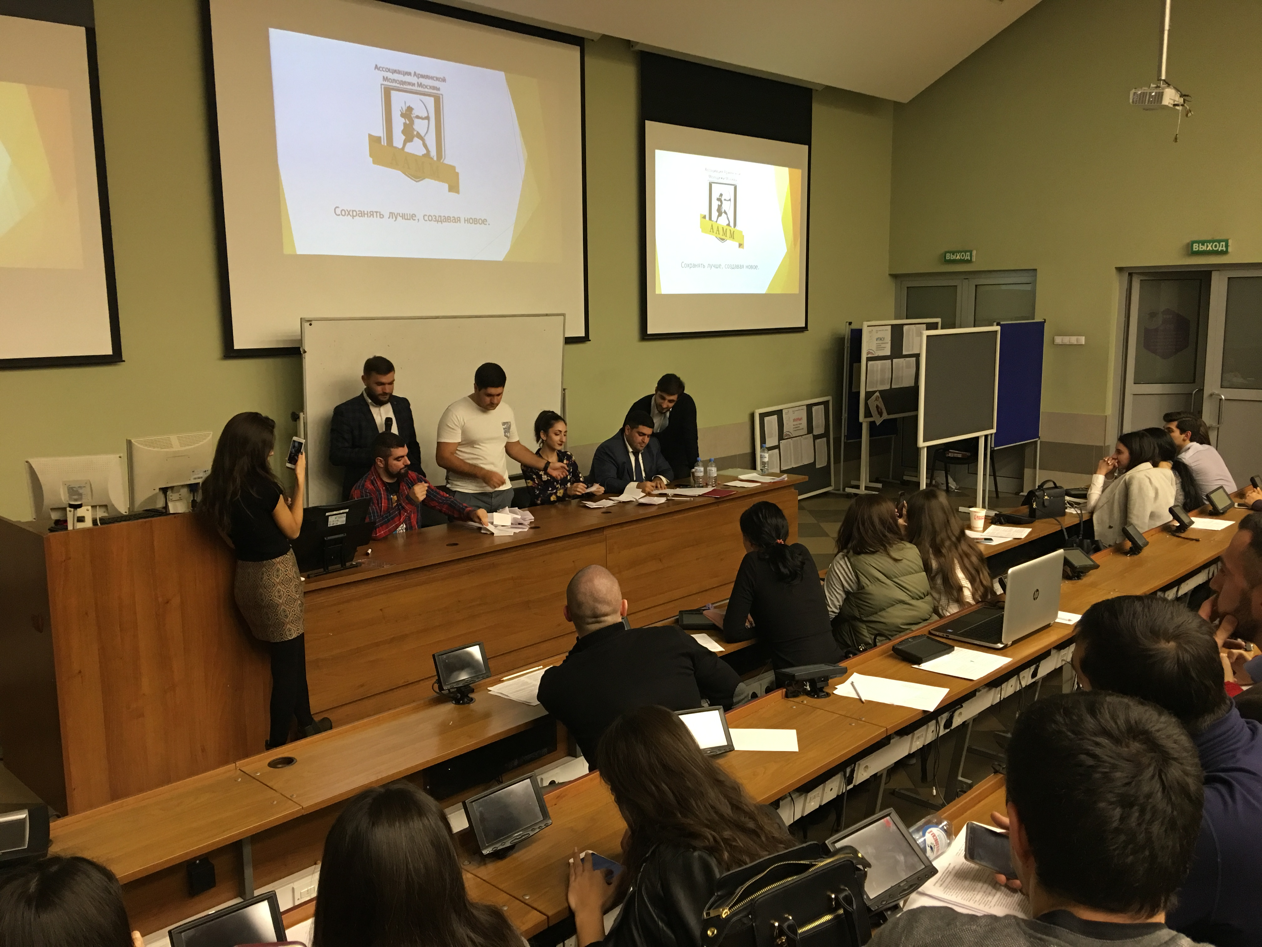 Մոսկվայի հայ երիտասարդության ասոցիացիայի նախագահի ընտրություններ, 2017 սեպտեմբերի 28